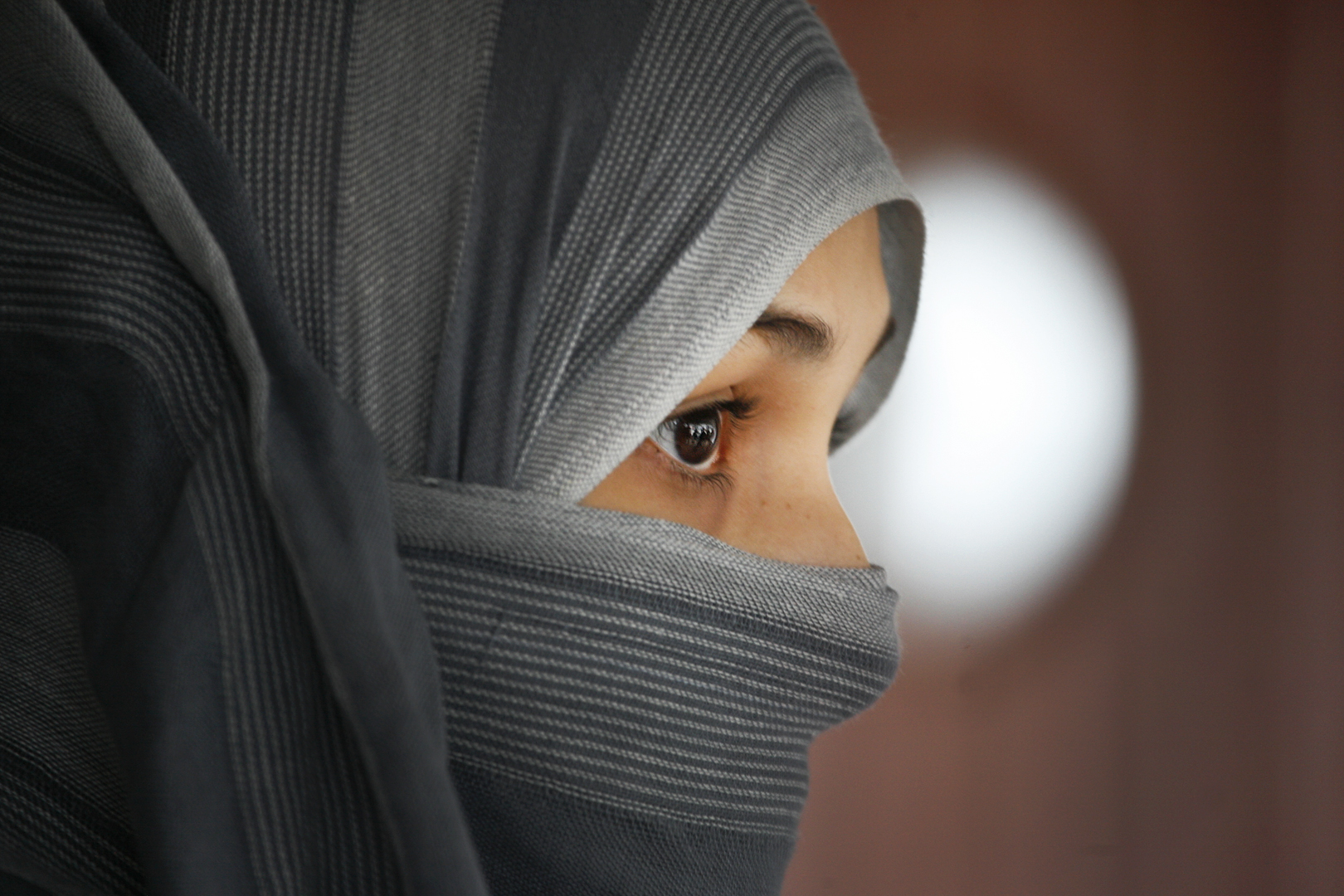 Istanbul 002